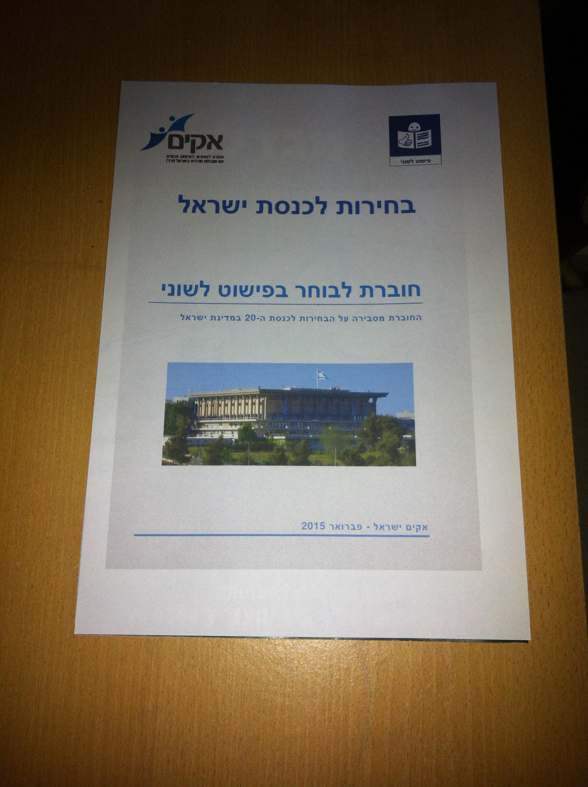 שער חוברת לבוחר בפישוט לשוני בהוצאת אקים ישראל